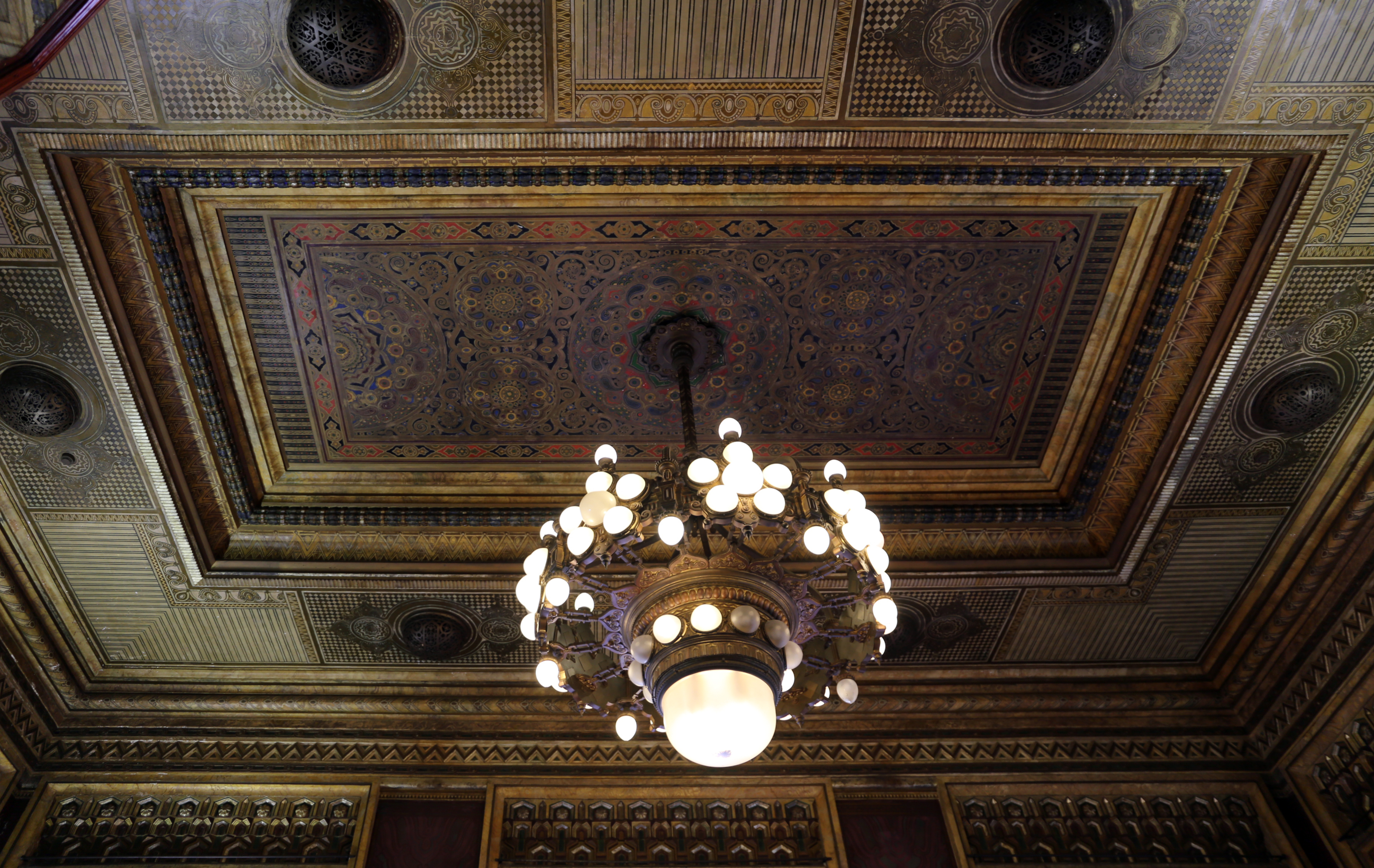 Palazzo dei Congressi (Salsomaggiore Terme) This is a photo of a monument which is part of cultural heritage of Italy.